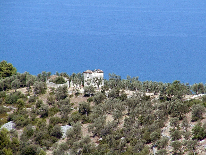 Lago di Varano Contrada Chianca (Parco Nazionale del Gargarno)